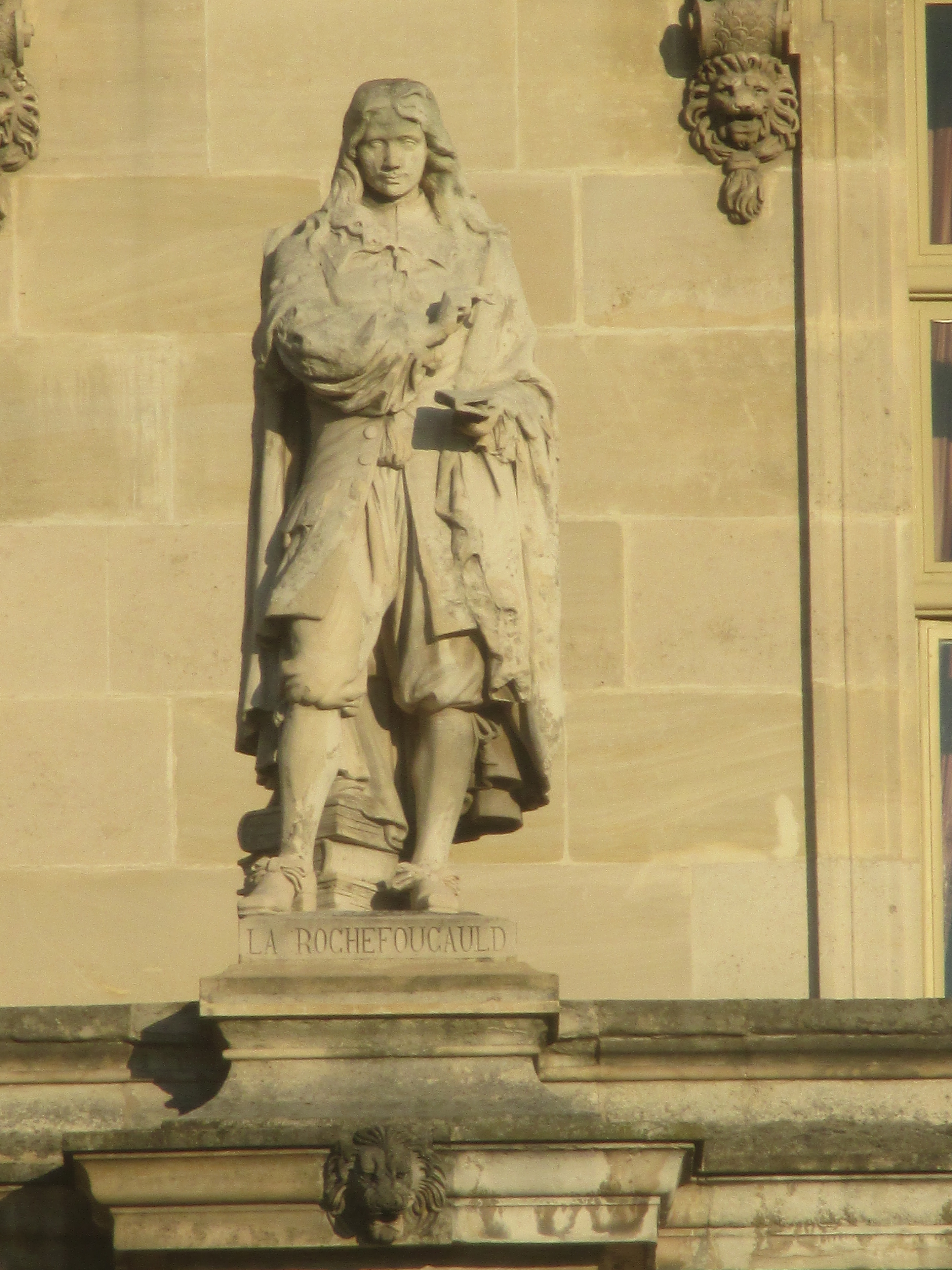 Statue de La Rochefoucauld au Louvre